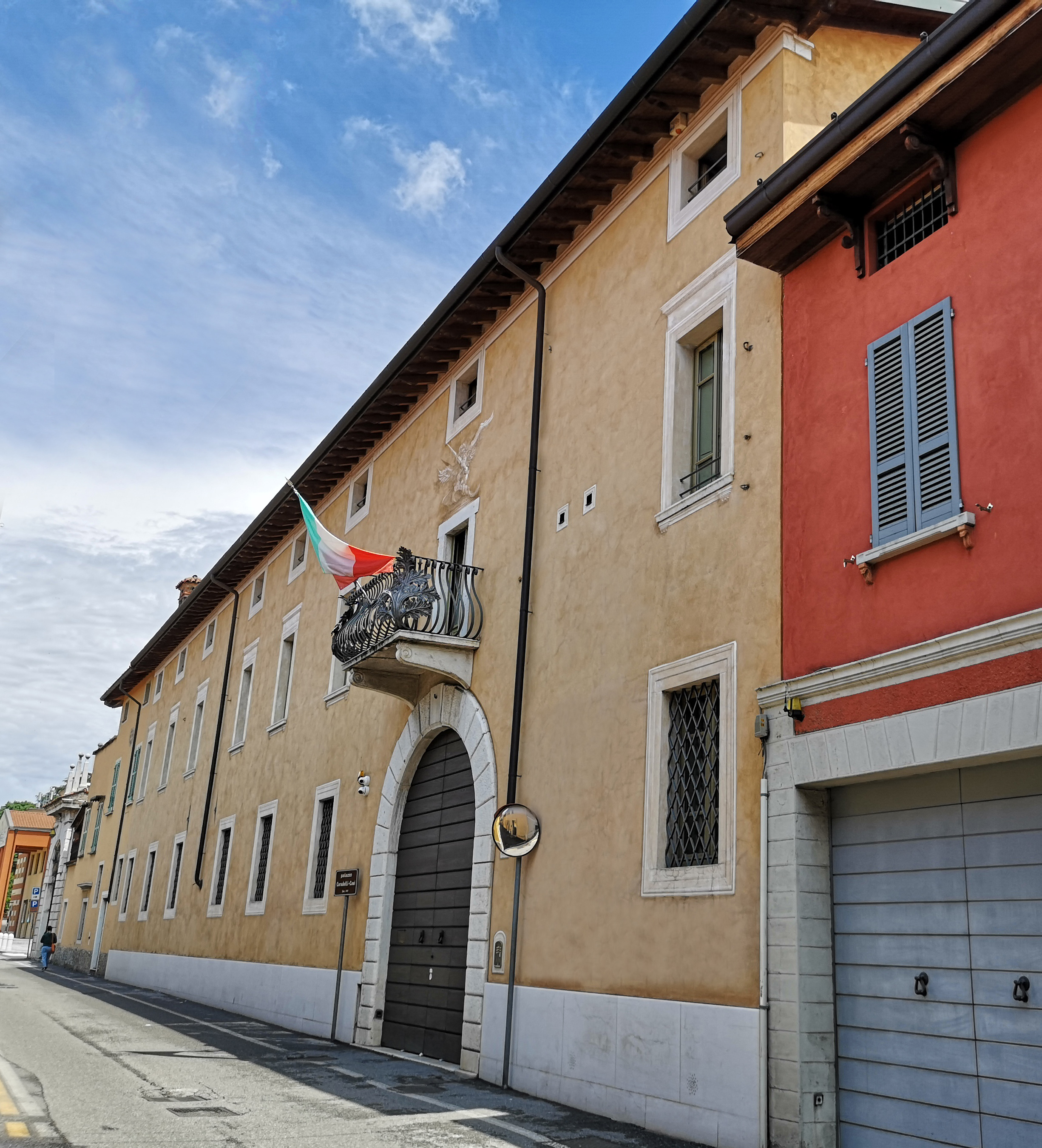 Palazzo Coradelli in Via Vittorio Emanuele II, Travagliato